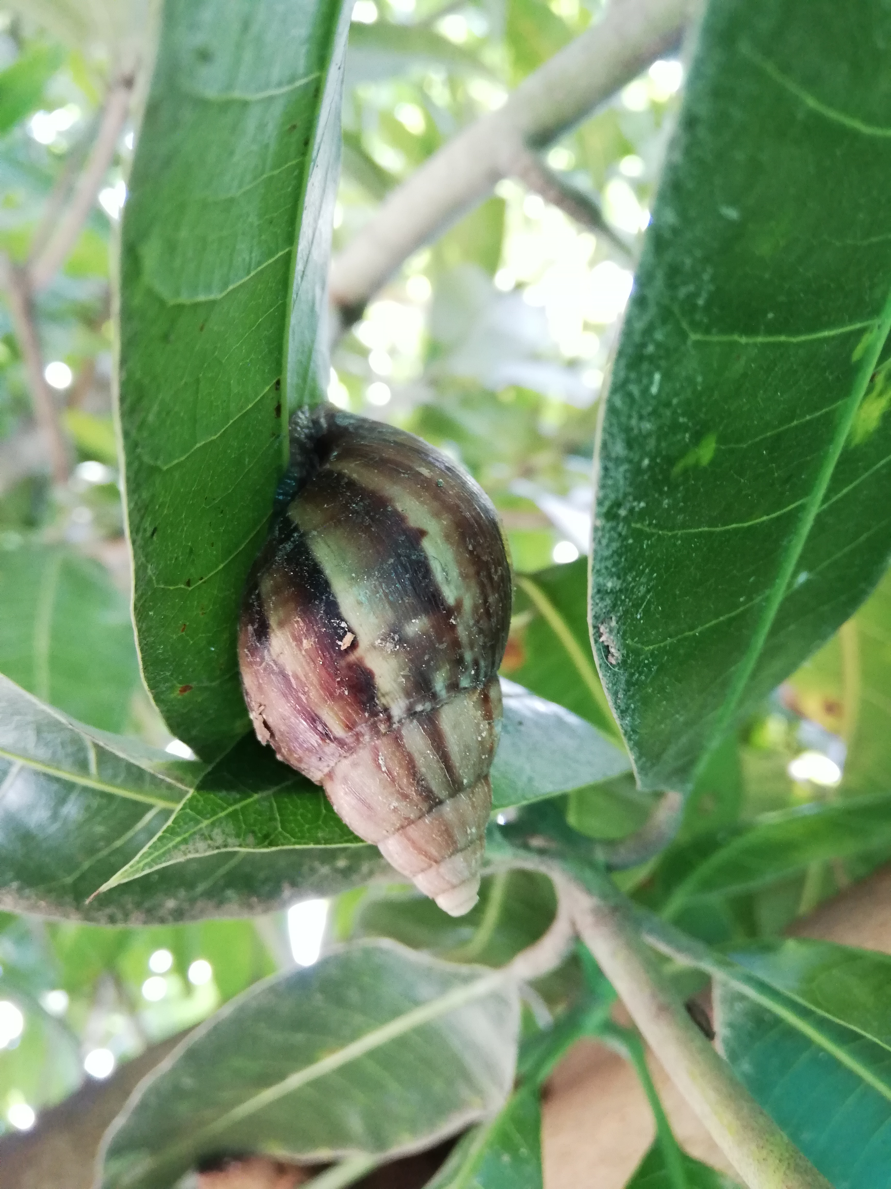 Caracol africano (Achatina fulica) en un árbol Mangifera (mango) en zonas rurales de Ibagué, Tolima, Colombia.